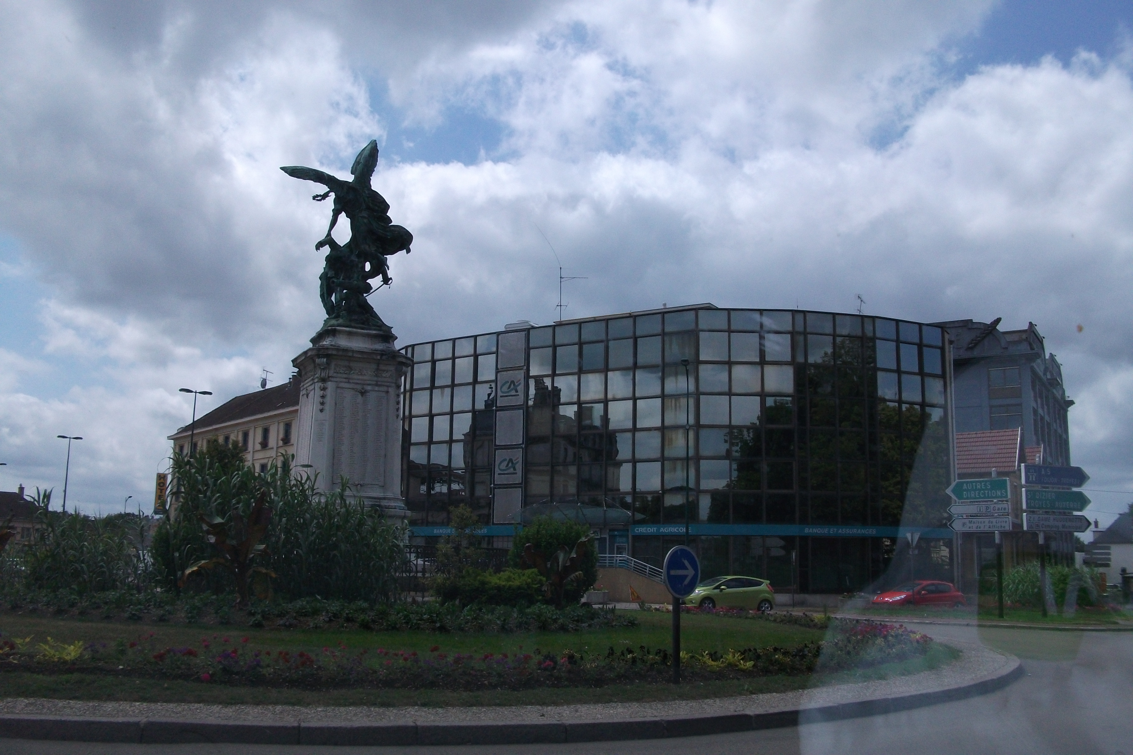 statue commémorant la guerre de 1870 de Chaumont par Tony-Noel.